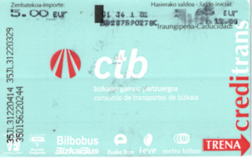 Creditrans por la cara "trena"